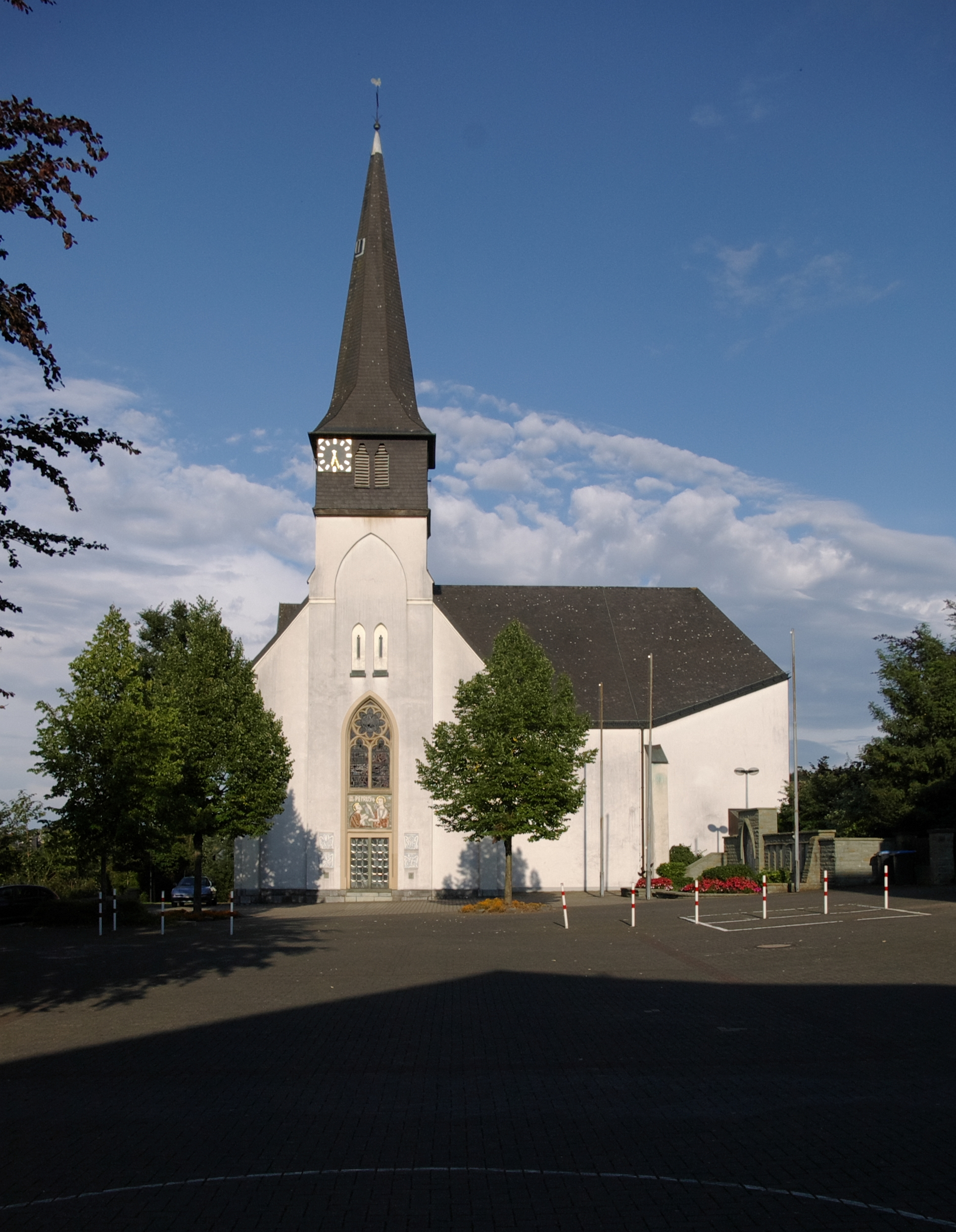 St. Vinzenz in Echthausen, Wickede.